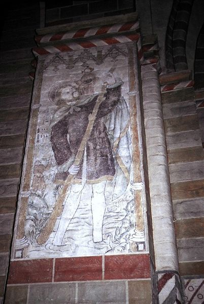 Sorø Klosterkirke